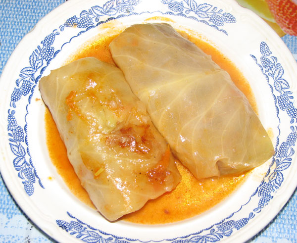 Голубцы